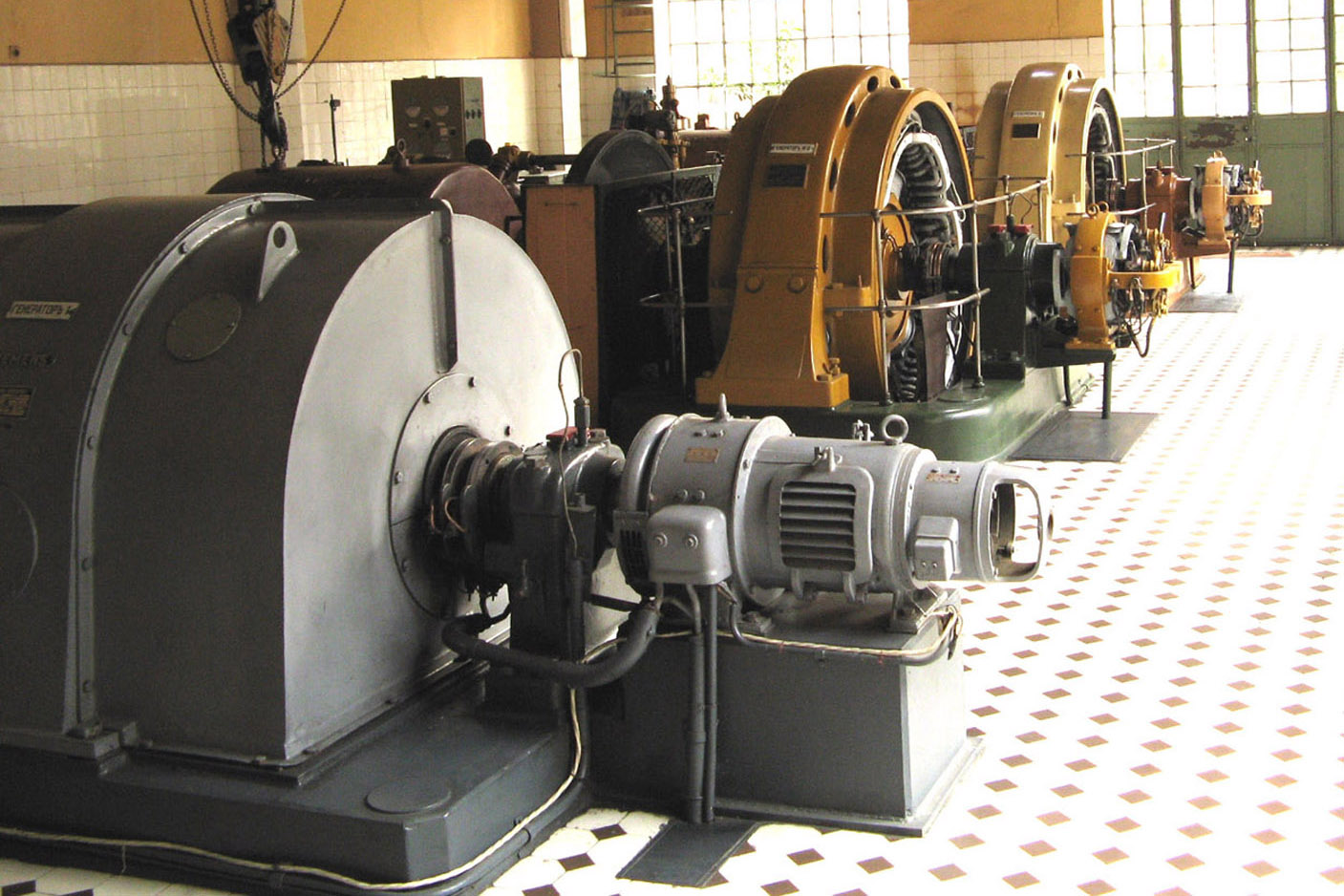 ВЕЦ Енина, Казанлък, България